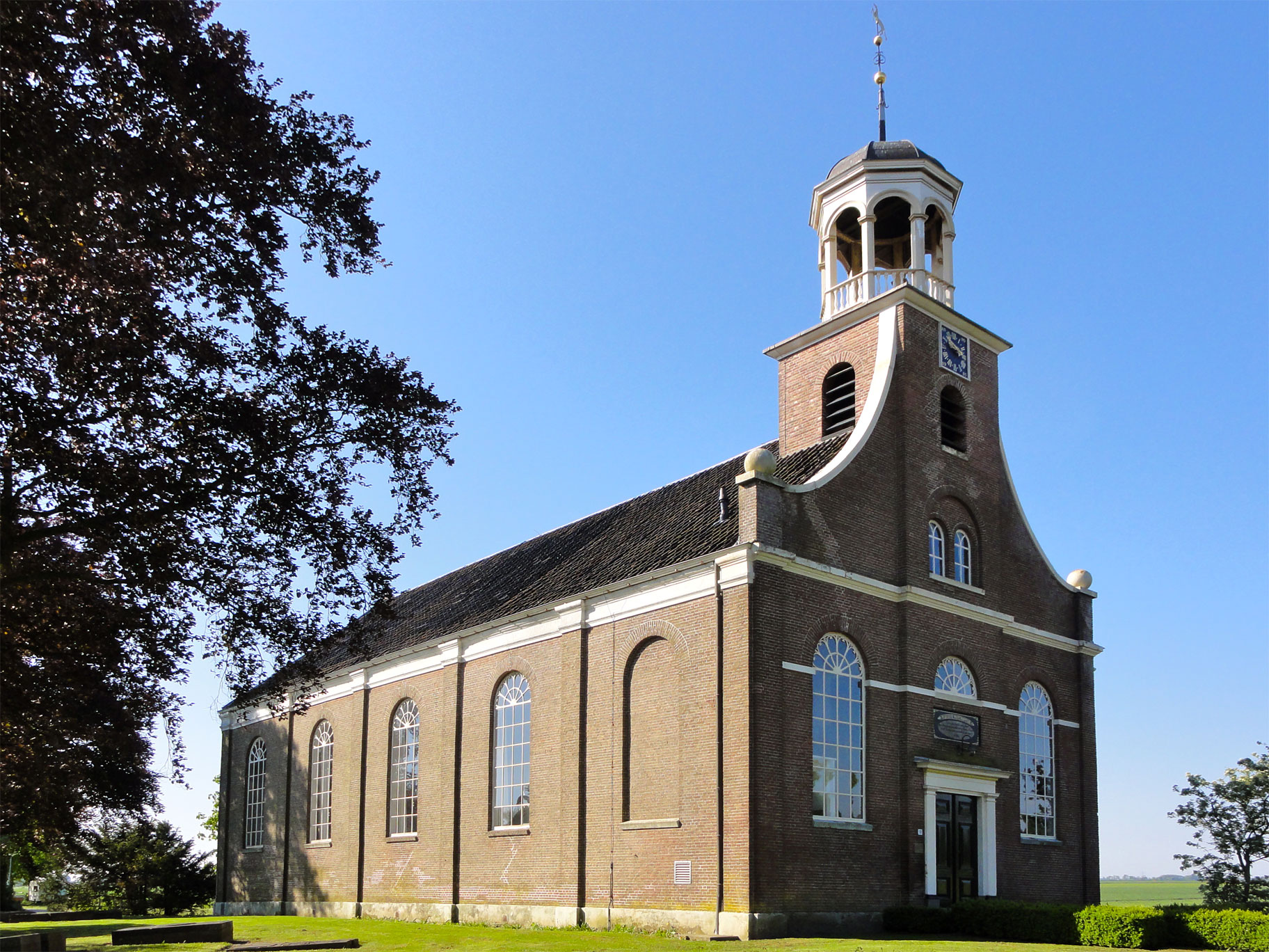 Waterstaatskerk van Nieuw-Beerta Hoofdweg 18 Nieuw-Beerta